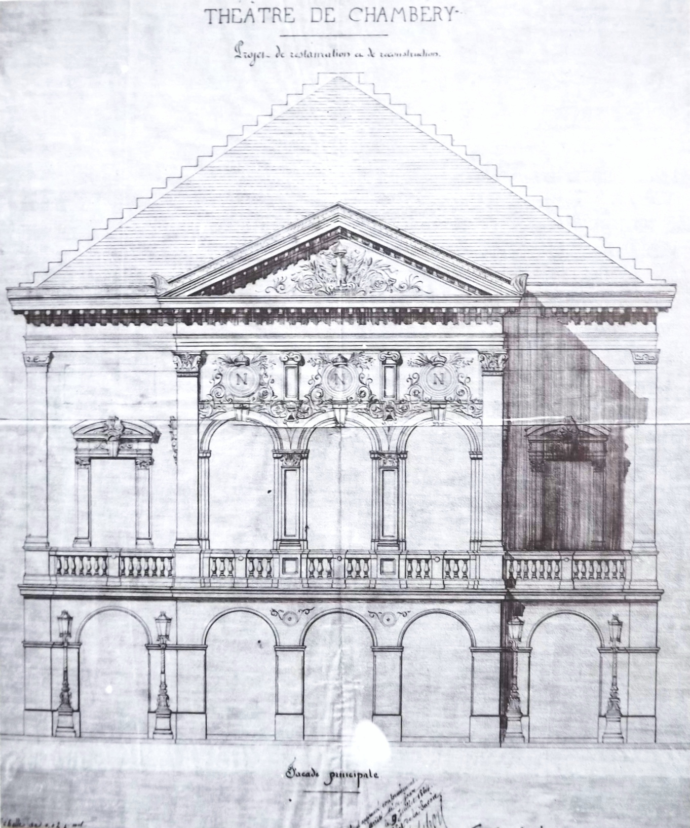 Plan de la façade principale du théâtre Charles Dullin de Chambéry.